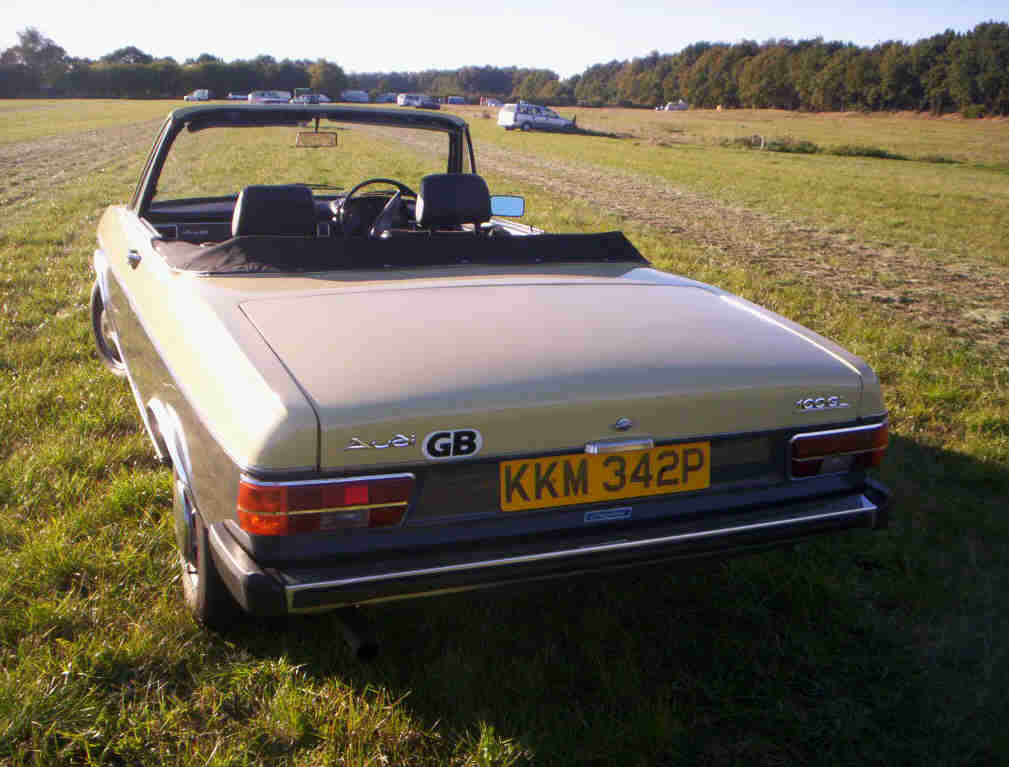 Das Letzte von nur neun Cabrios auf Basis des Audi 100, bebaut bei Crayford